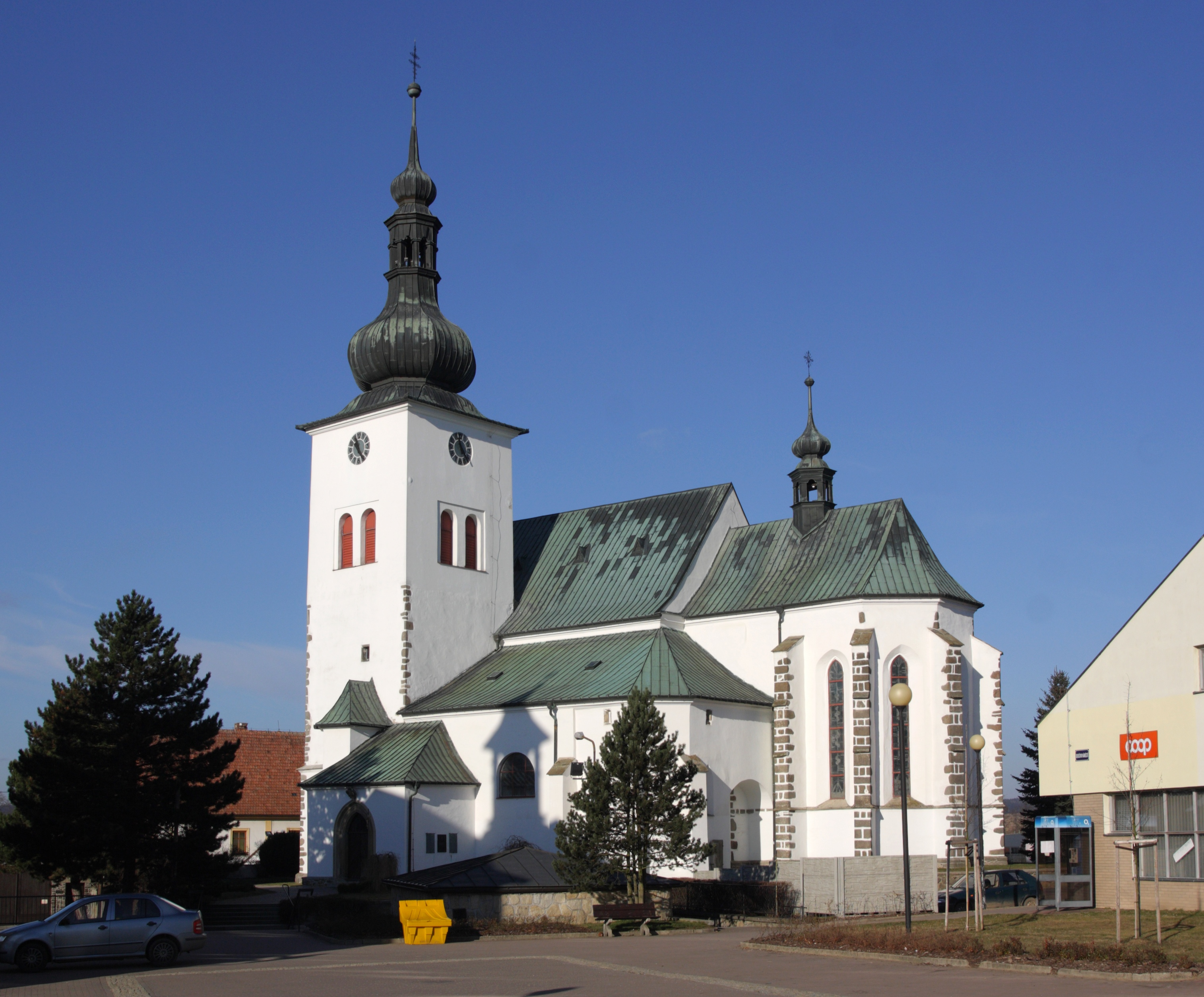 Křižanov (okres Žďár nad Sázavou) - kostel svatého Václava.